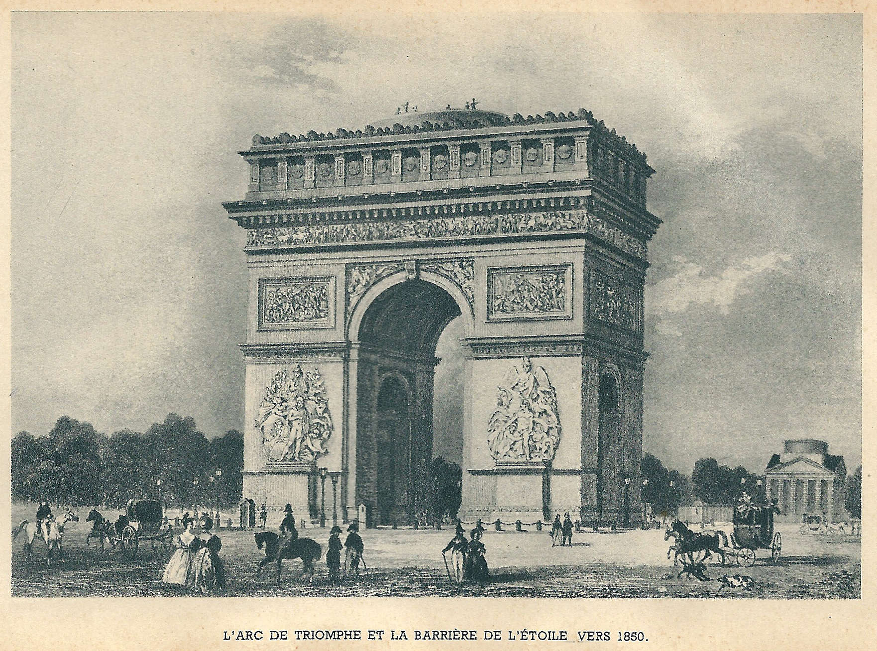 Arc de triomphe & barrière de l’Étoile à Paris (Seine, France) en 1850